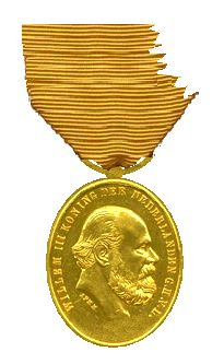 Medaille VOOR IJver en Trouwe Dienst in Goud 1877 - 1894 Willem III , Koning der Nederlanden